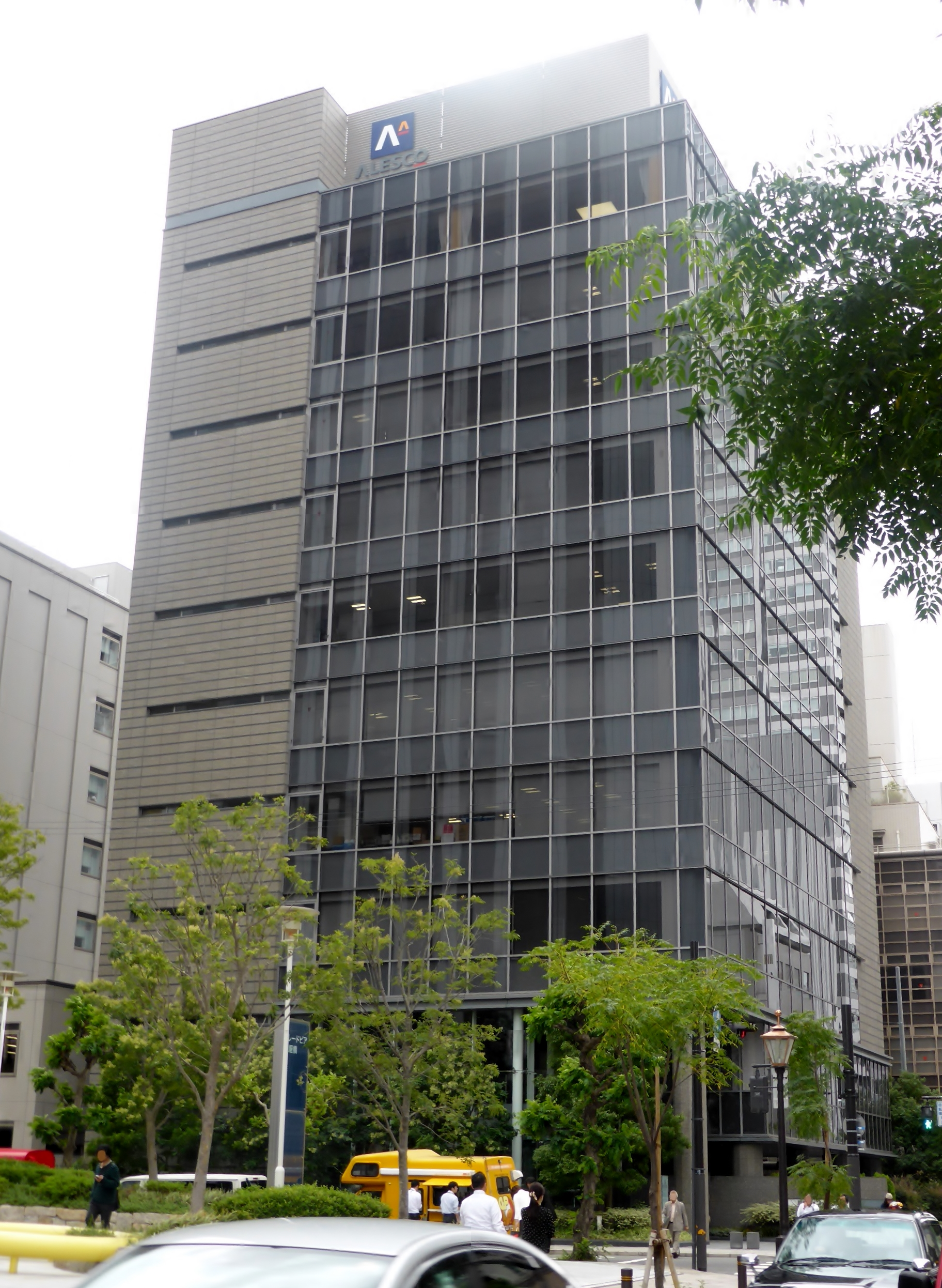 関西ペイント株式会社本社を撮影